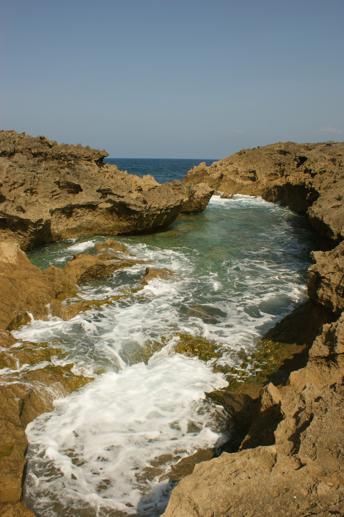 Playa Mar Chiquita, Manati, Puerto Rico